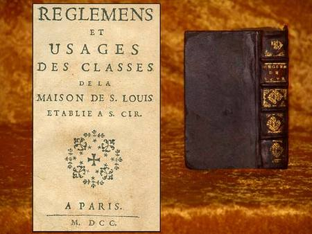 Règlement de collège. Éducation des filles. Institut Sait-Louis de Saint-Cyr, début XVIIIe sicle. Règne de Louis XIV.